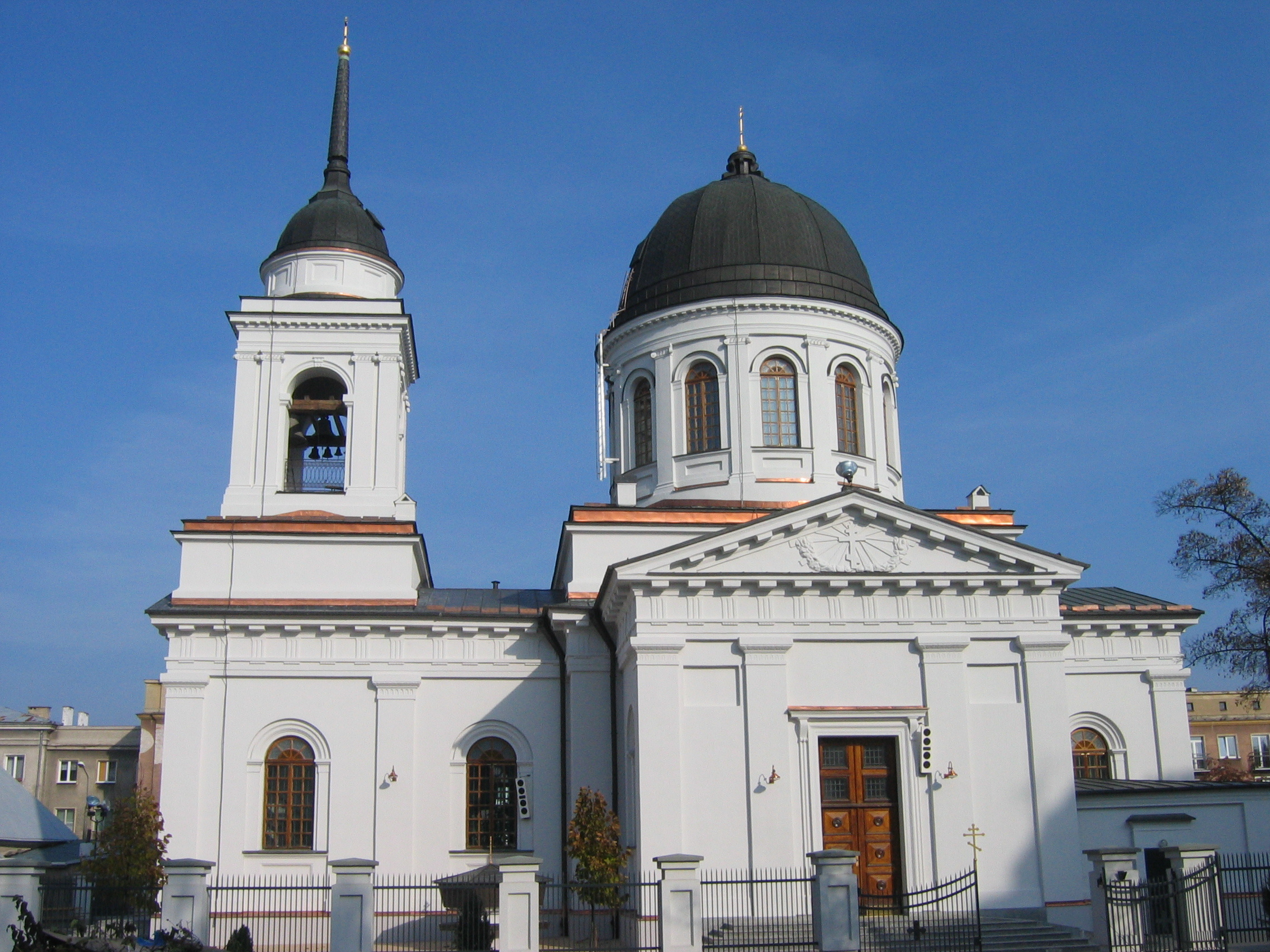 Sobór św. Mikołaja w Białymstoku